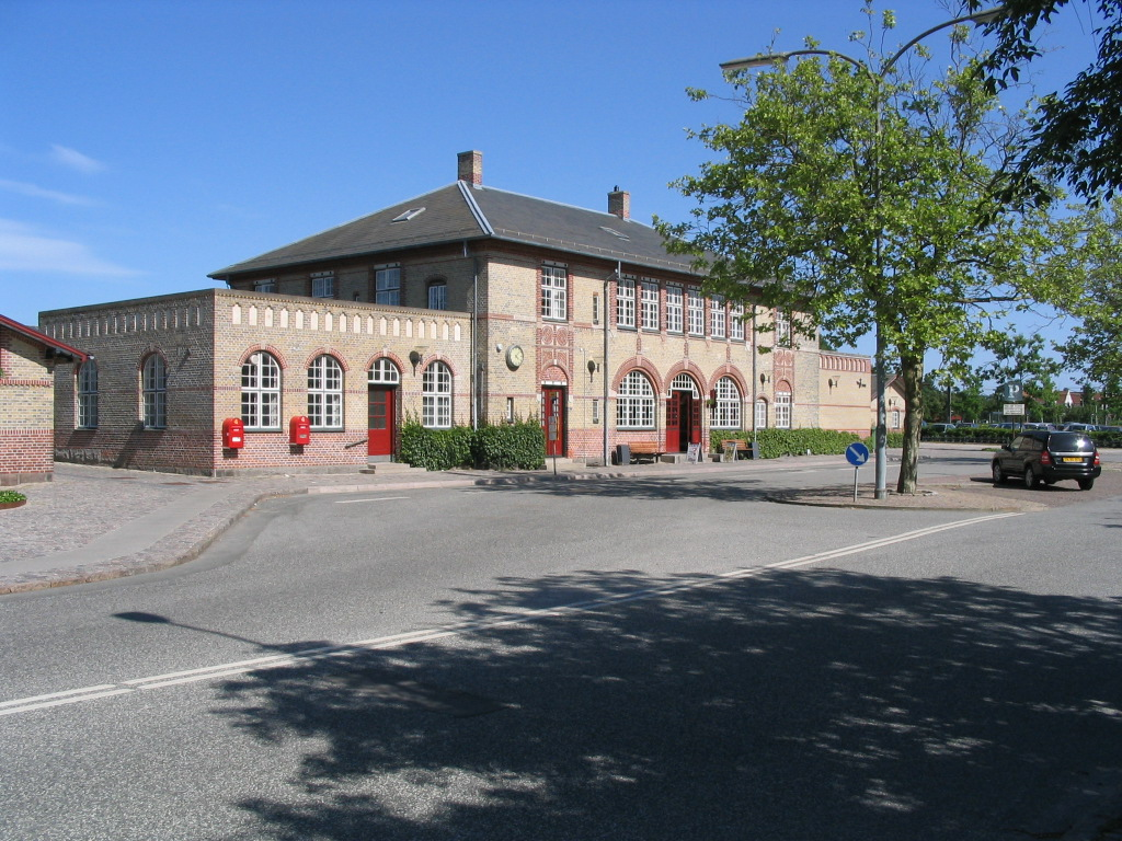 Rungsted Stasjon